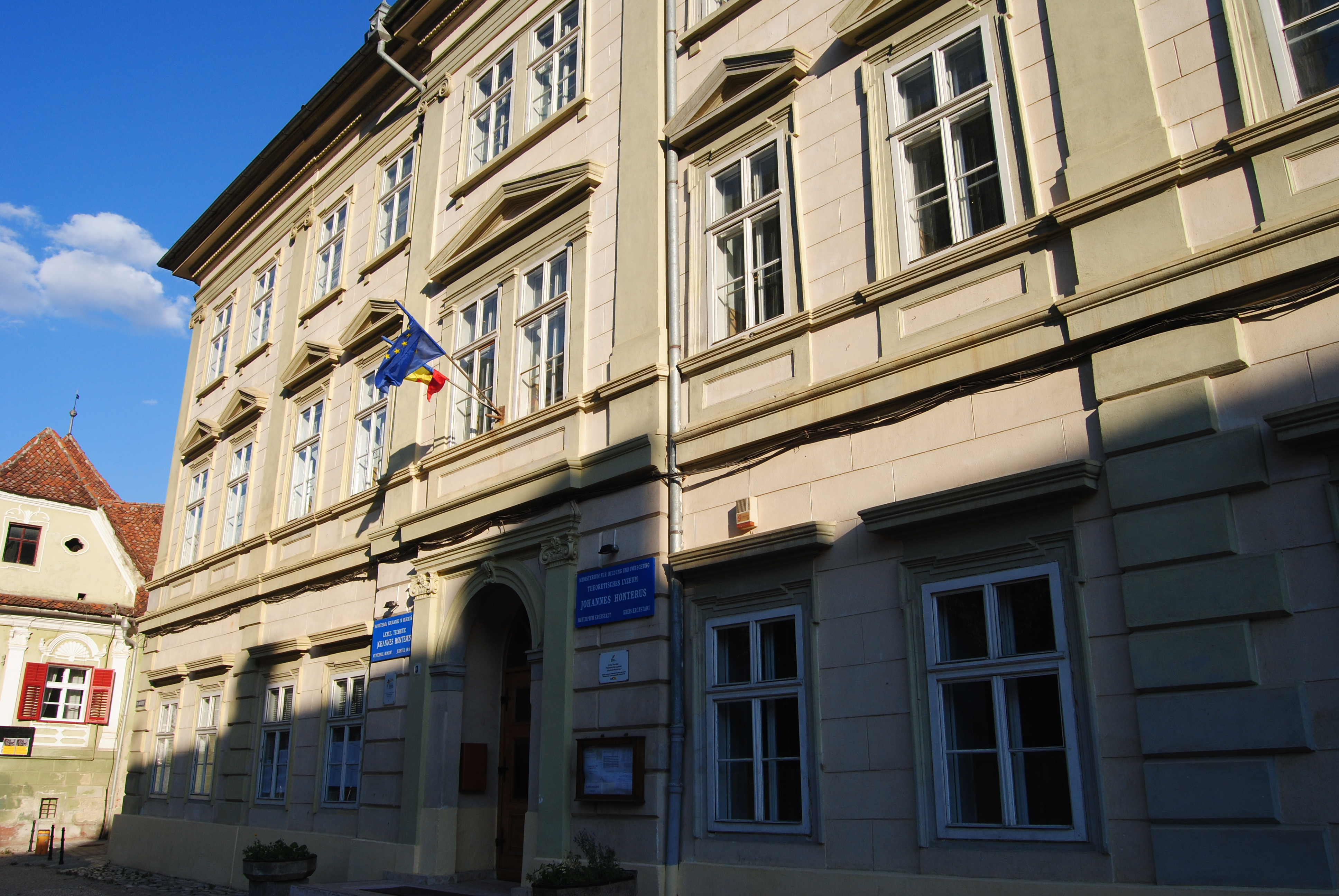 Fostul gimnaziu evanghelic, azi corpul B al Liceului "Johannes Honterus"